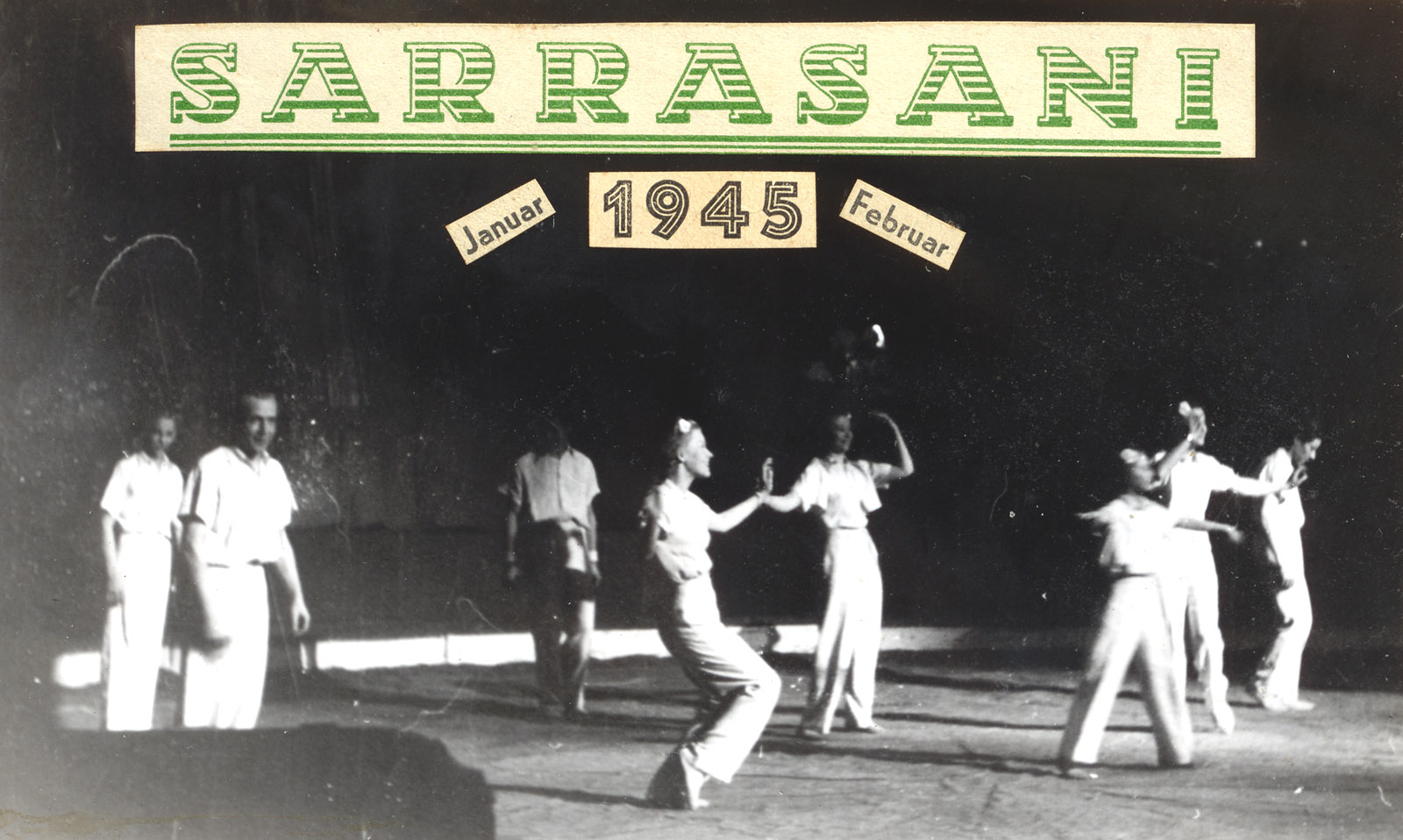 Bob Gerry Troupe im Circus Sarrasani in Dresden kurz vor dem Bombenhagel.